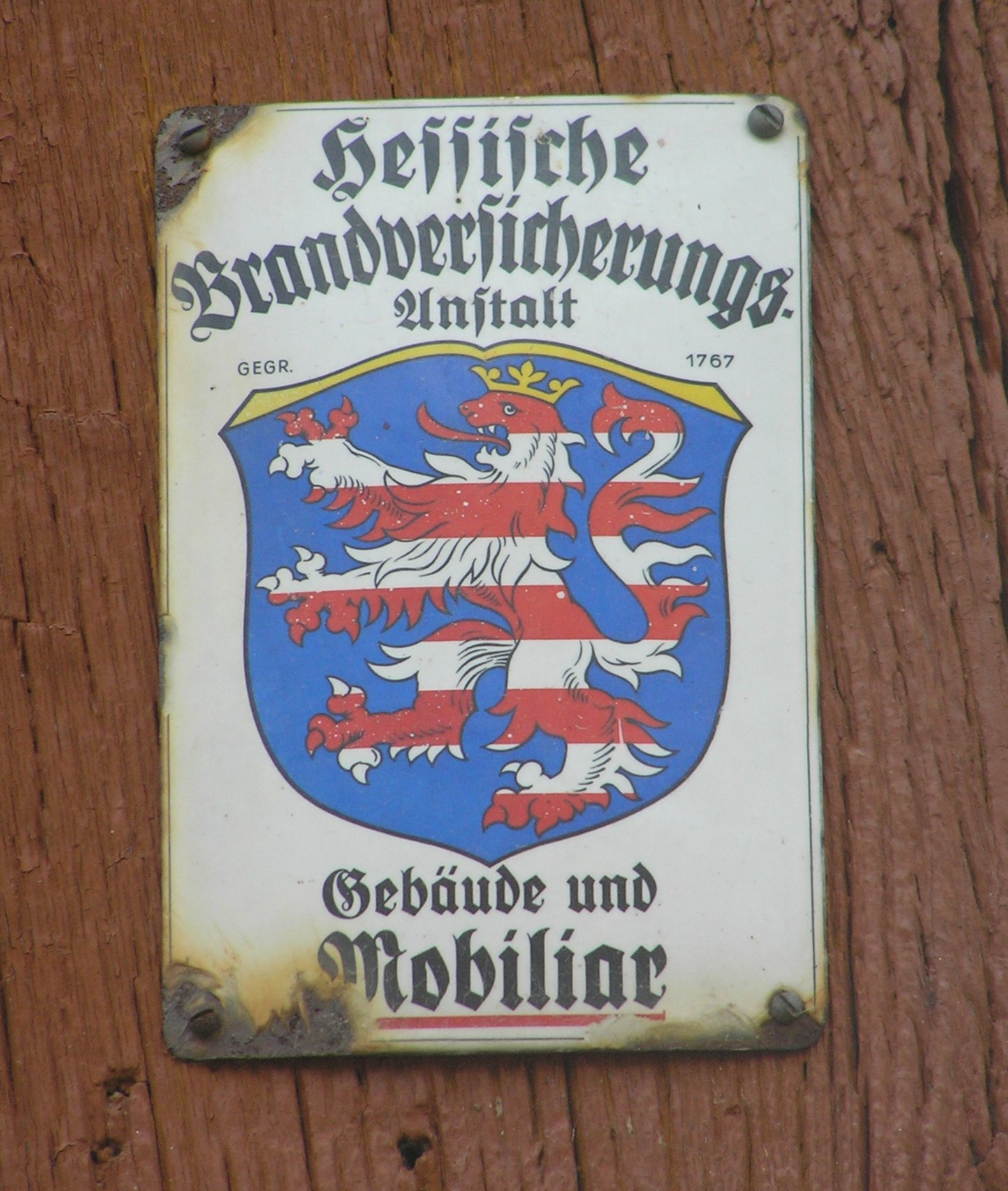 Hessenpark, Schild Nassauische Brandversicherungsanstalt